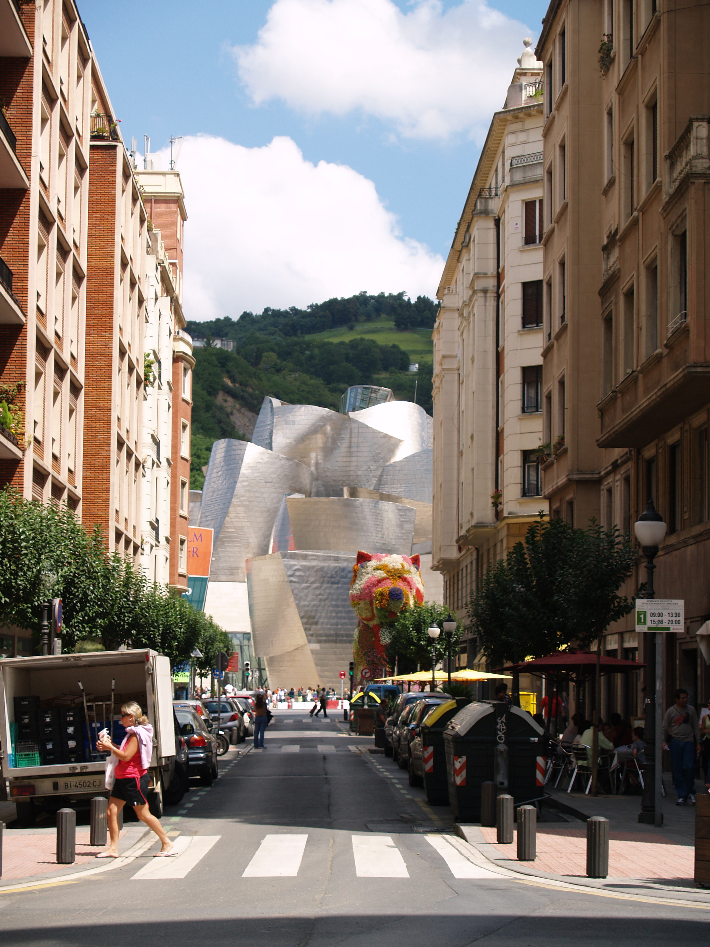 Puppy eta Guggenheim Museoa Iparragirre Etorbidetik